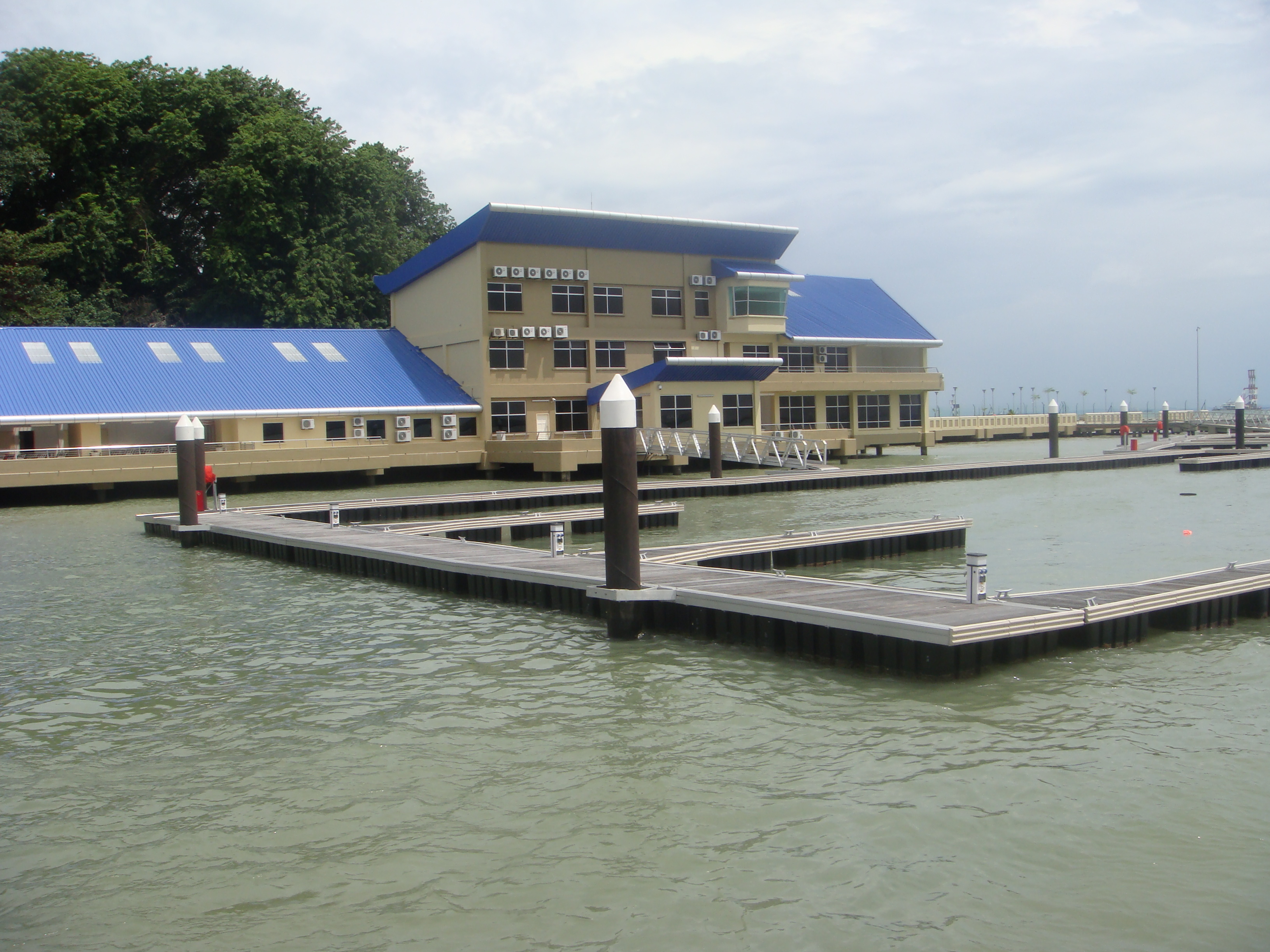 タンジュン・プングリ・マリーナ